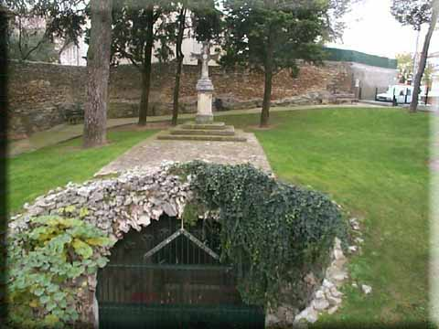 Cripta de Sant Baldiri, a Nimes, al lloc del martiri del sant, a les Trois Fontaines